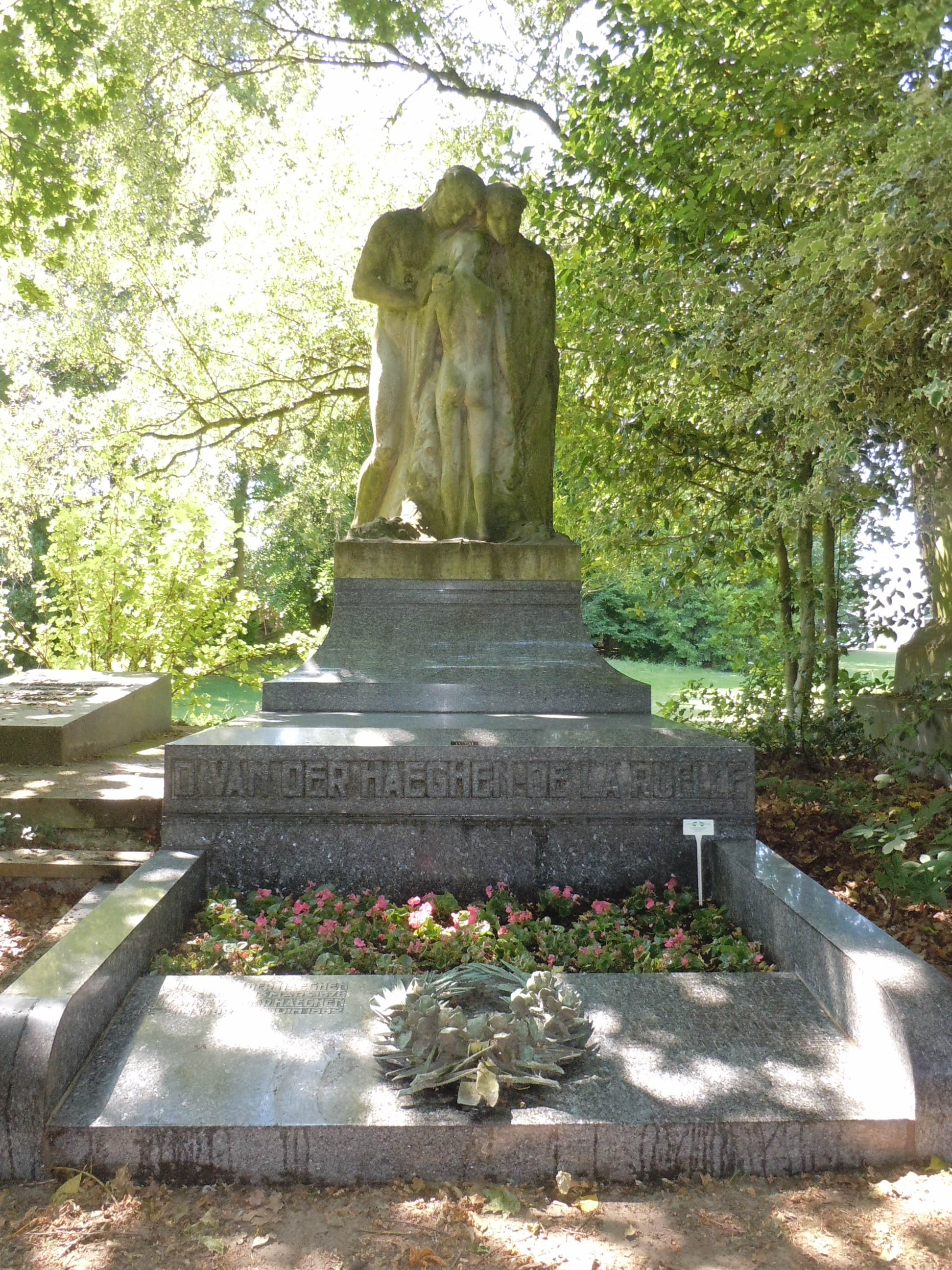 Gent Westergraafplaats Grafmonument Vanderhaeghen-Delaruelle